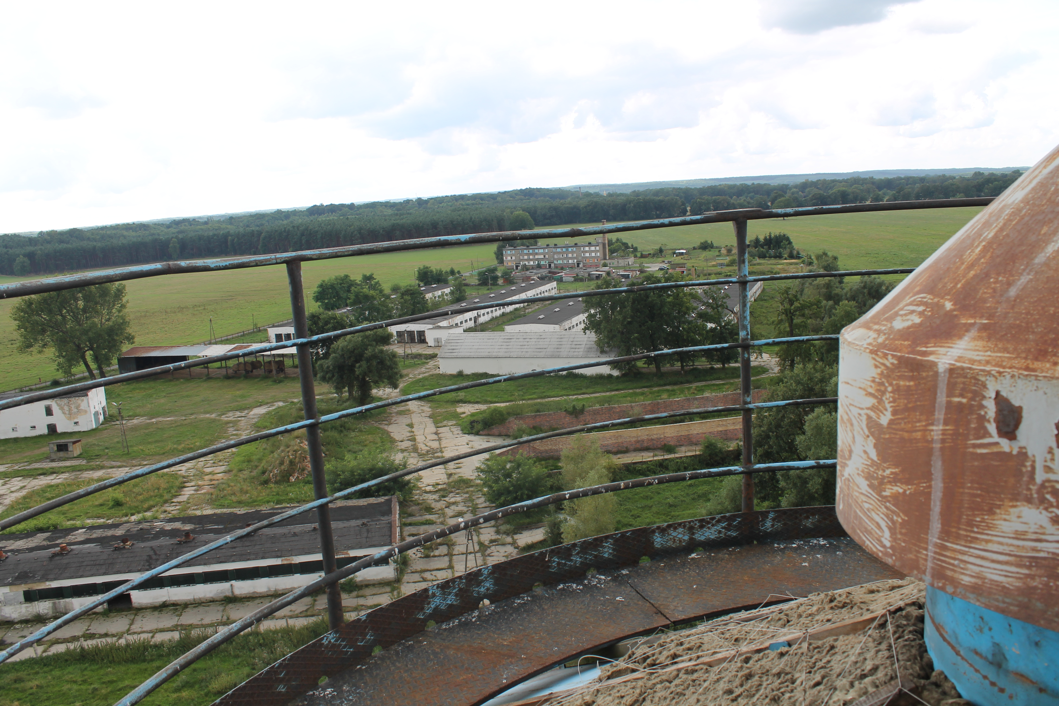 Widok w kierunku Jasienia